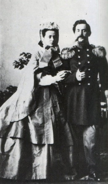 Альбединские :Пётр Павлович (1826—1883) и Алекса́ндра Серге́евна, урождённая княжна Долгорукова (18 (30) ноября 1834 — 12 сентября 1913)